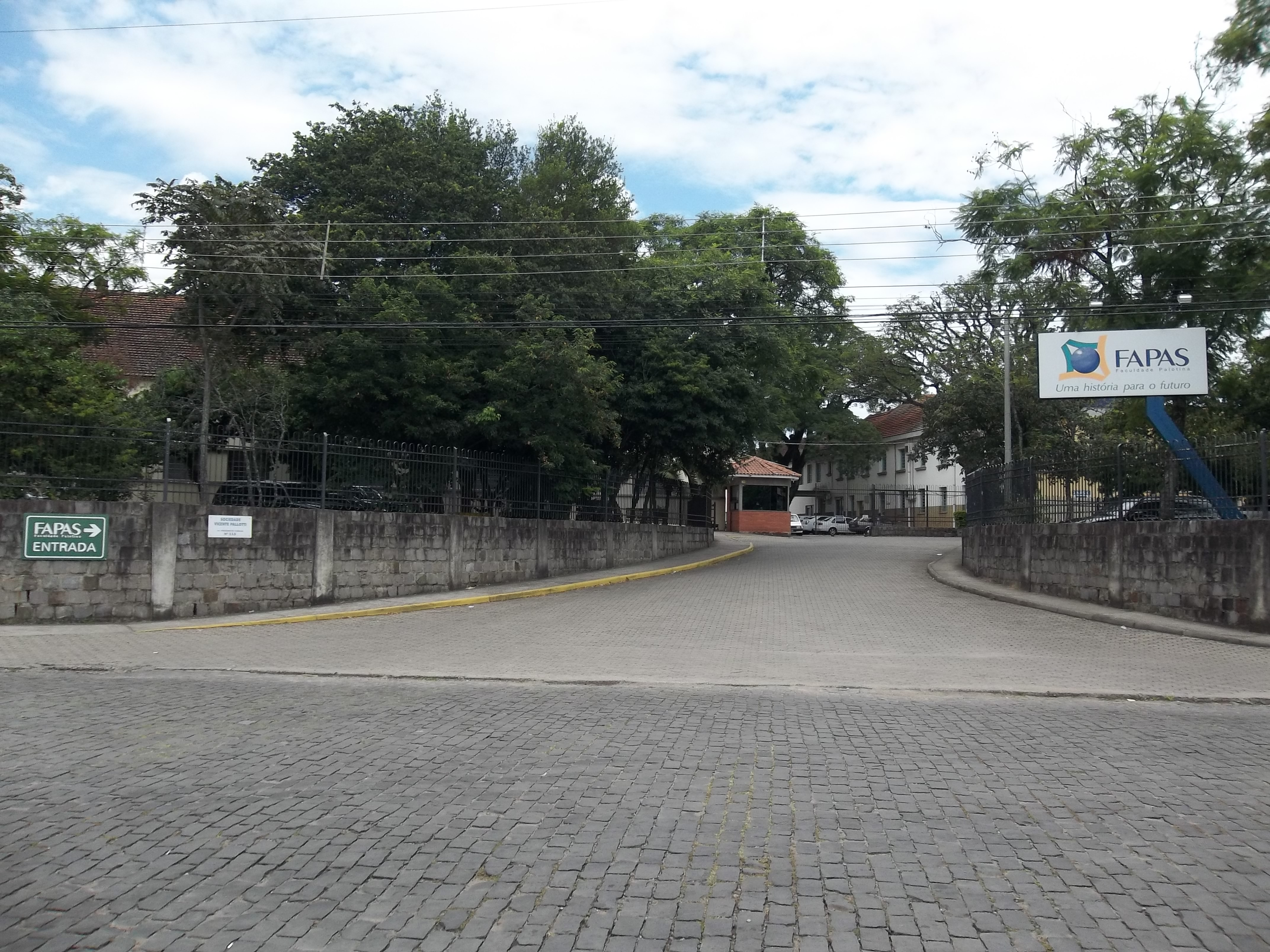 Faculdade Palotina (FAPAS), Patronato, Sede, Santa Maria, Rio Grande do Sul, Brasil